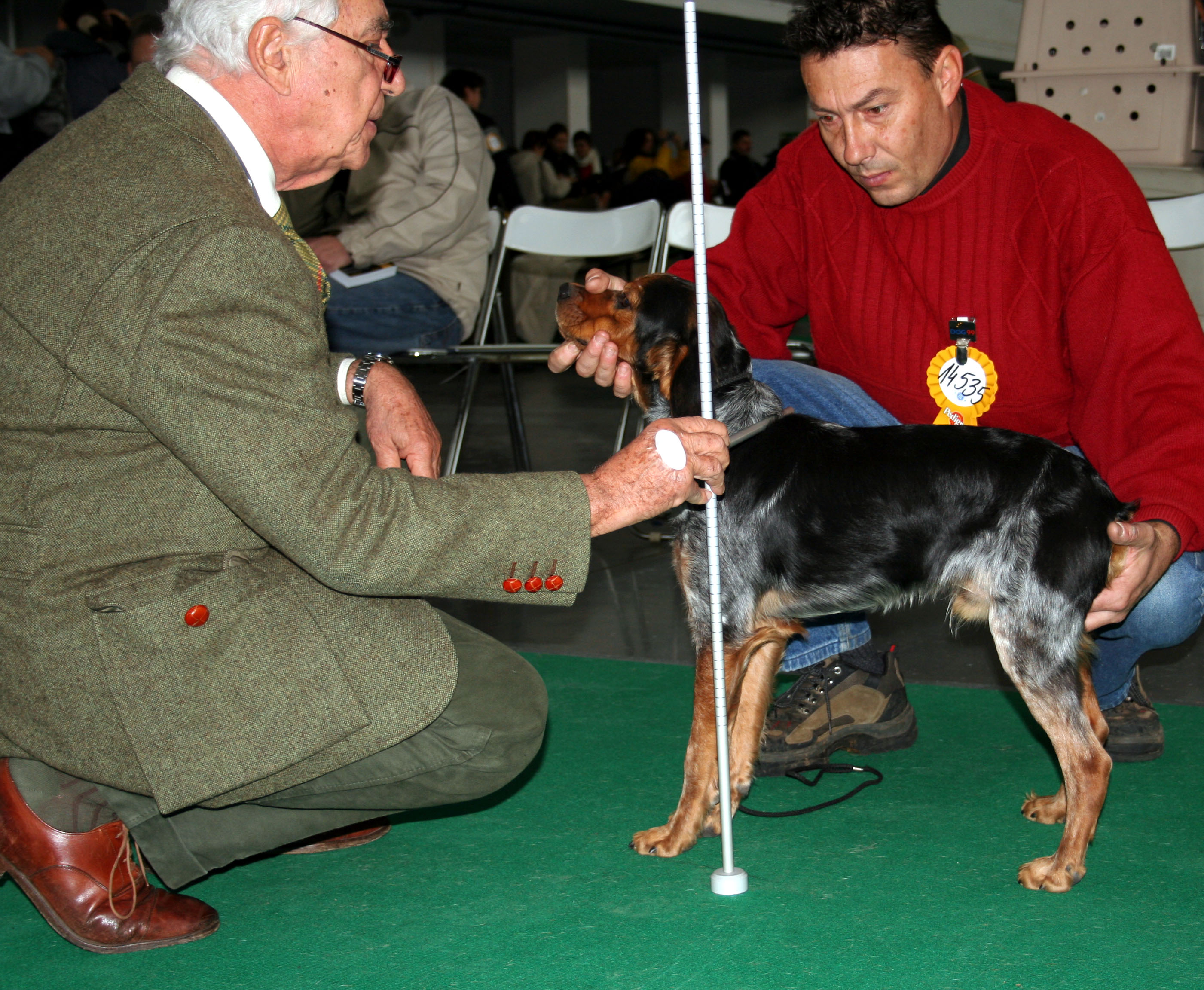 Epagneul breton - pomiar wysokości w kłębie na Światowej Wystawie Psów Rasowych w Poznaniu.